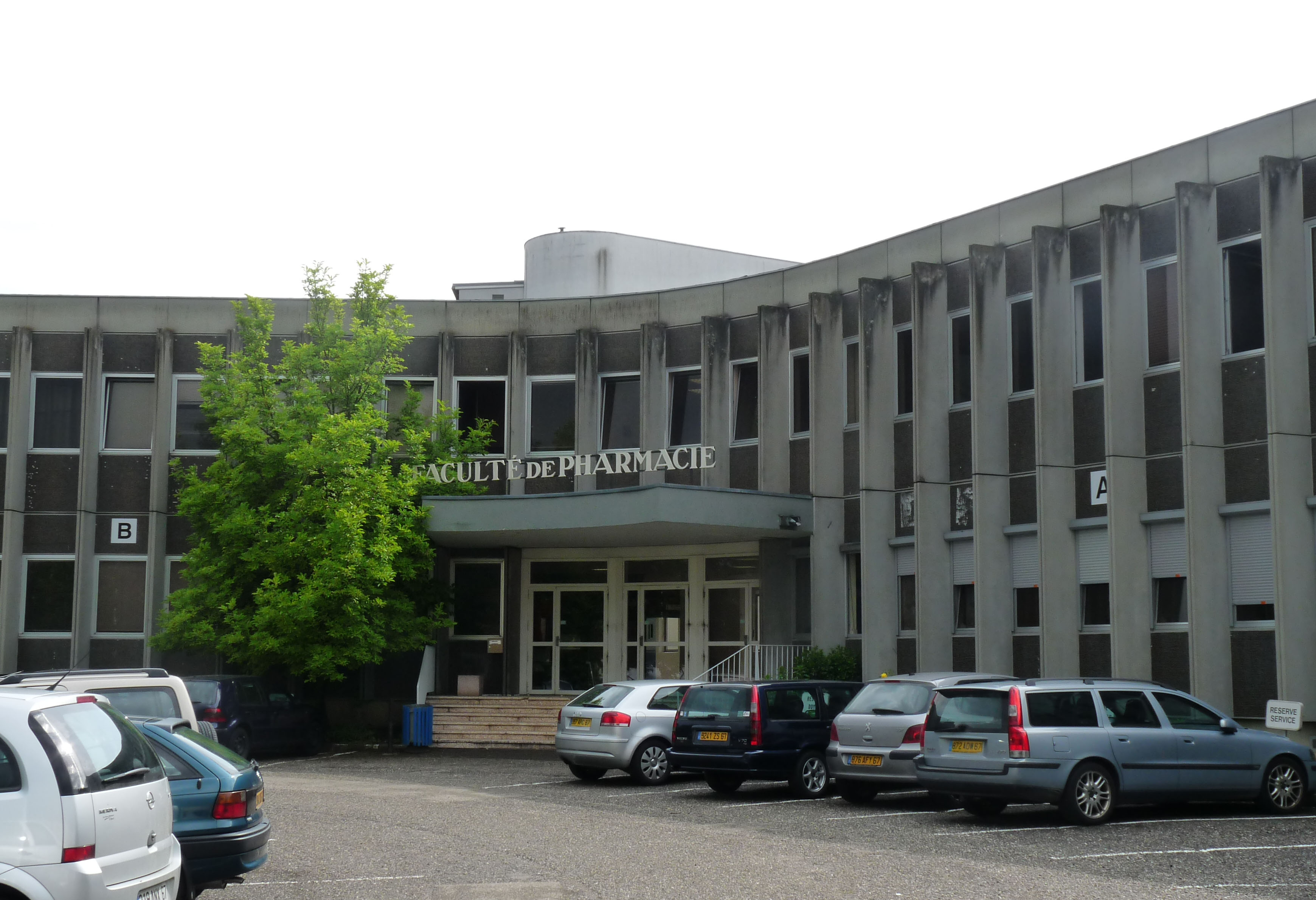 Faculté de Pharmacie à Illkirch-Graffenstaden (Communauté urbaine de Strasbourg)